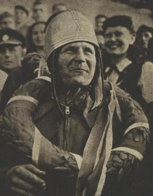 Hugo Rosák (1916-1982), československý plochodrážní jezdec